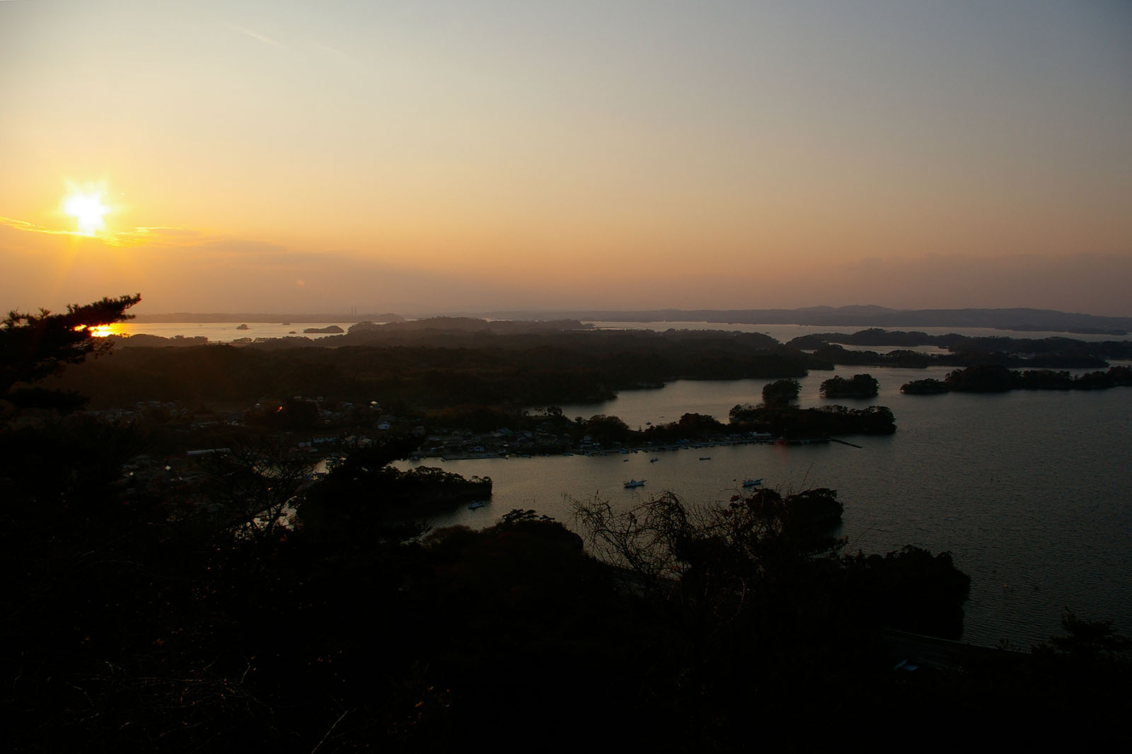 Ootakamori viewpoint, evening.